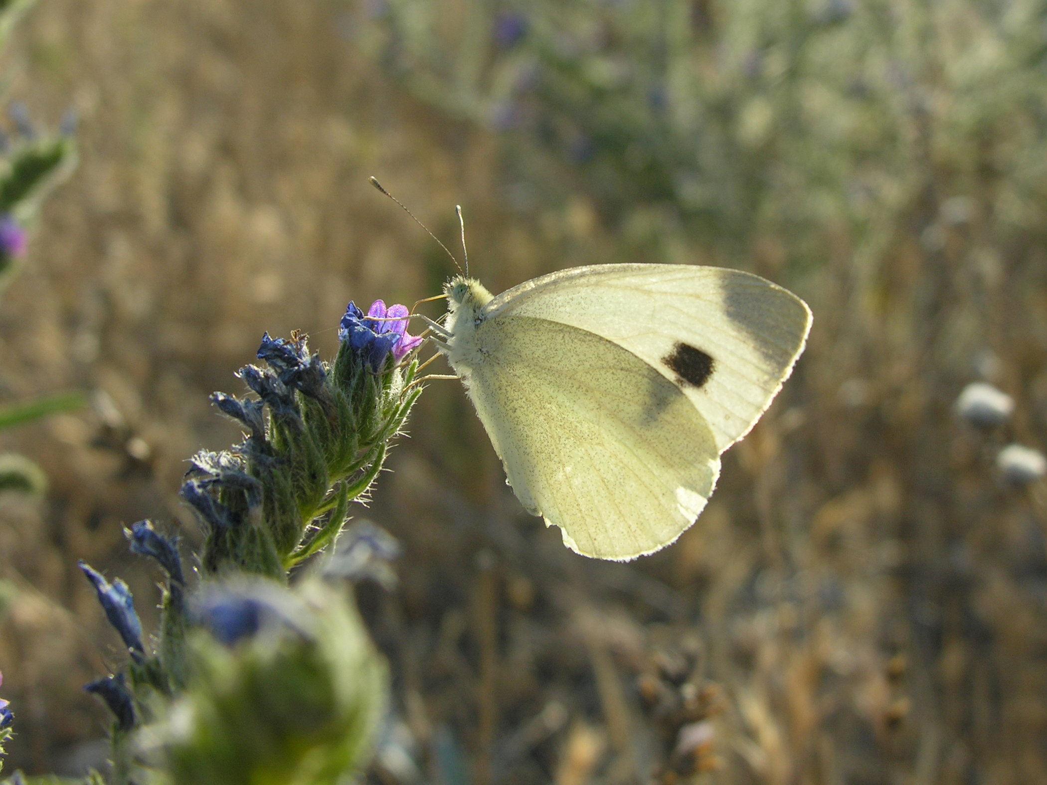 Artogeia mannii (Pieridae). Rivas Vaciamadrid, Madrid, España.